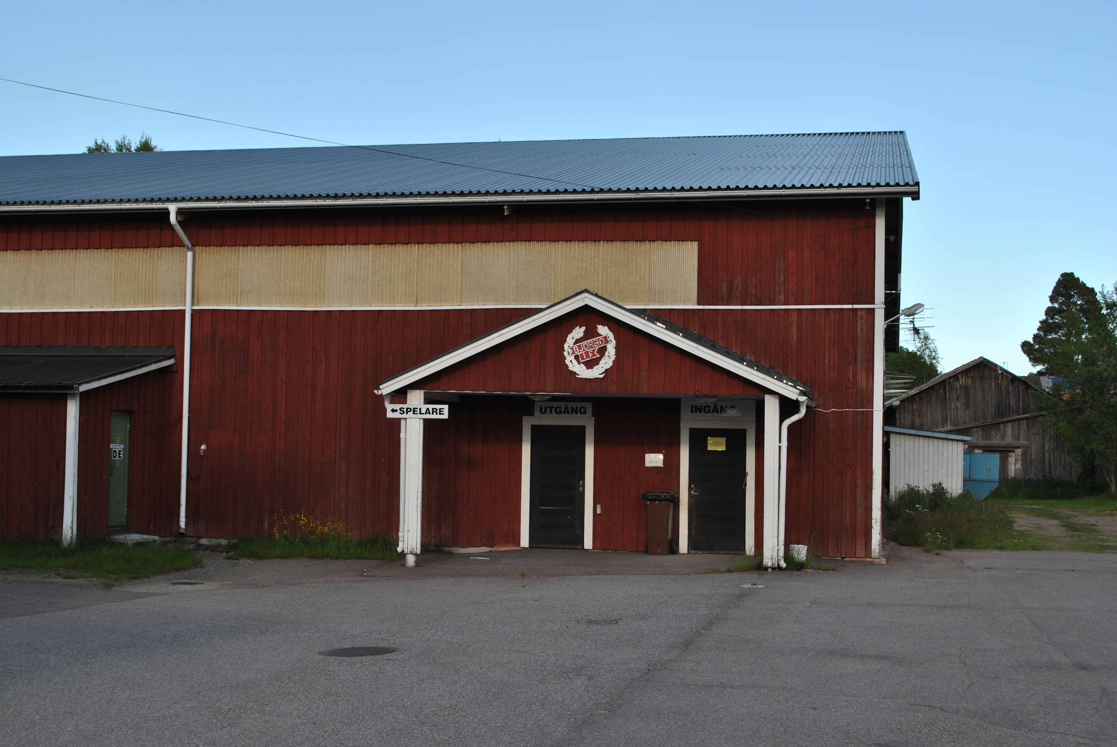 Björbo IF, ishall